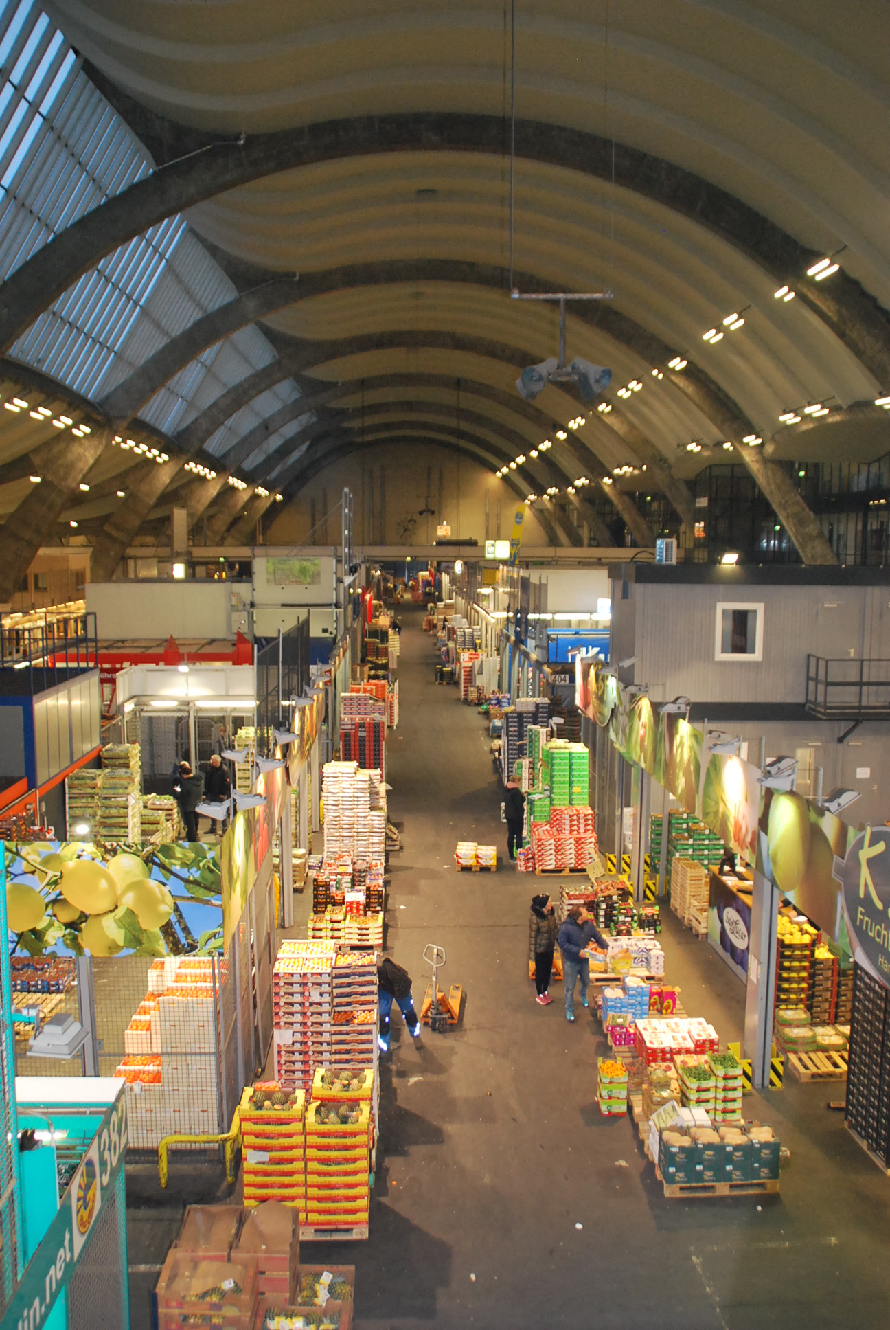 Großmarkthallen innen bei Betrieb